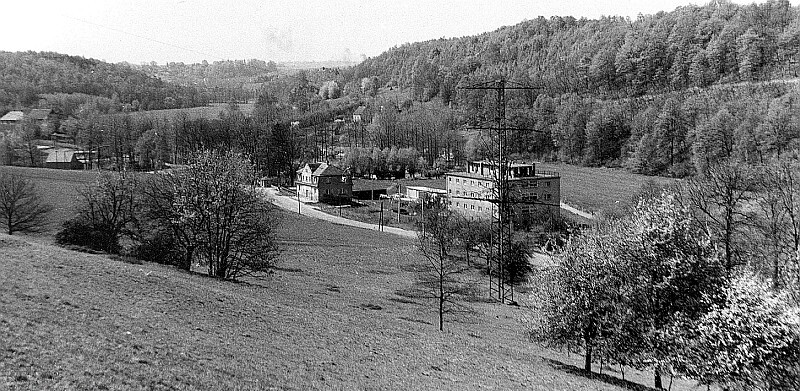 Original image description from the Deutsche FotothekTriebischtal-Munzig. Ehem. Mühlenstandort, später Pappenfabrik